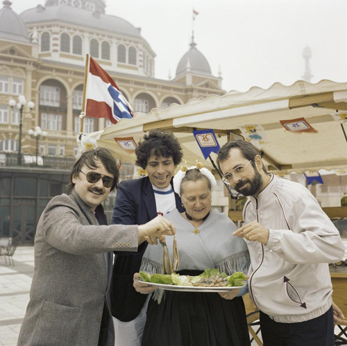 Het Belgische trio Telex tijdens een fotosessie voor het Eurovisie Songfestival 1980